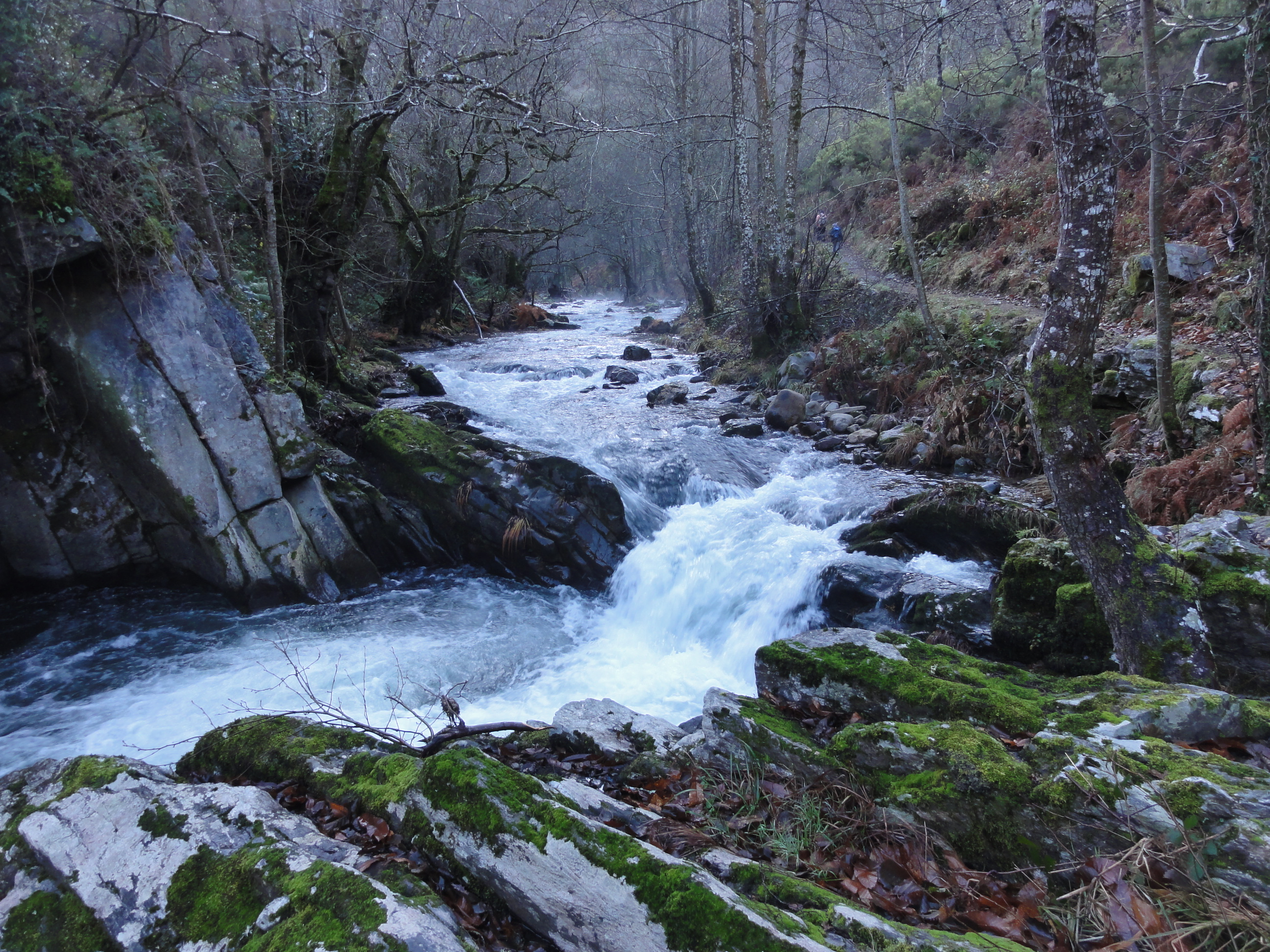 Río Eo: foto tomada al hacer la Ruta da Marronda (Alto Eo) This is a photography of a Site of Community Importance in Spain with the ID: ES1120002. Natura2000 entry, EEA entry